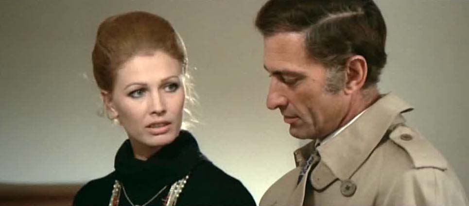 Screenshot del film Una farfalla con le ali insanguinate, 1971, regia di Duccio Tessari.